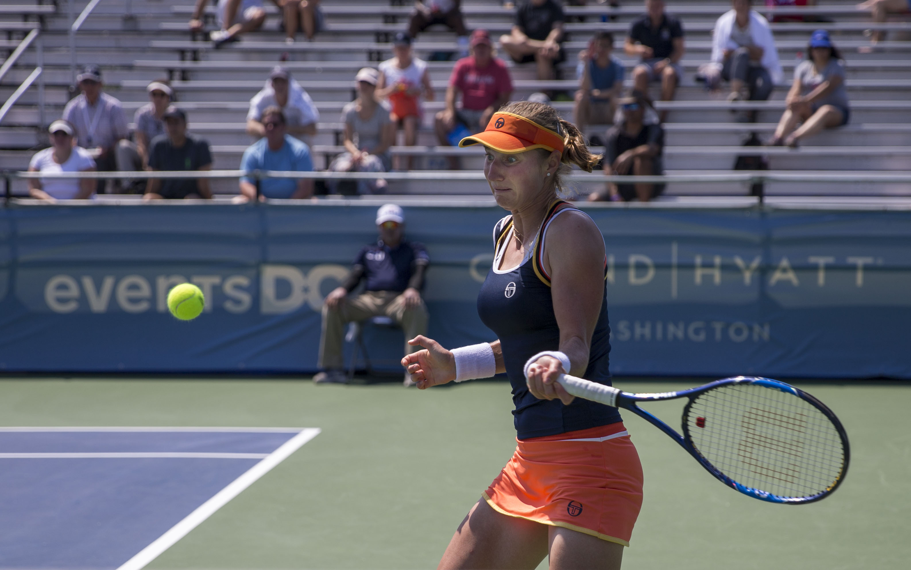 Citi Open Tennis 2017